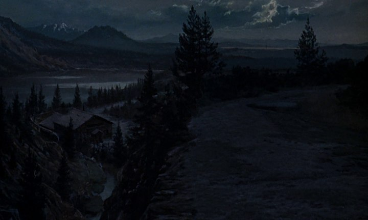 Скриншот фильма "Горгона" 1964 года.